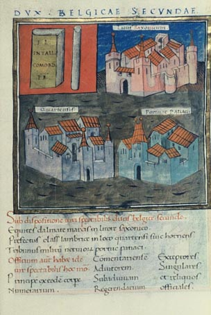 Dux Belgicae secundae from Notitia dignitatum